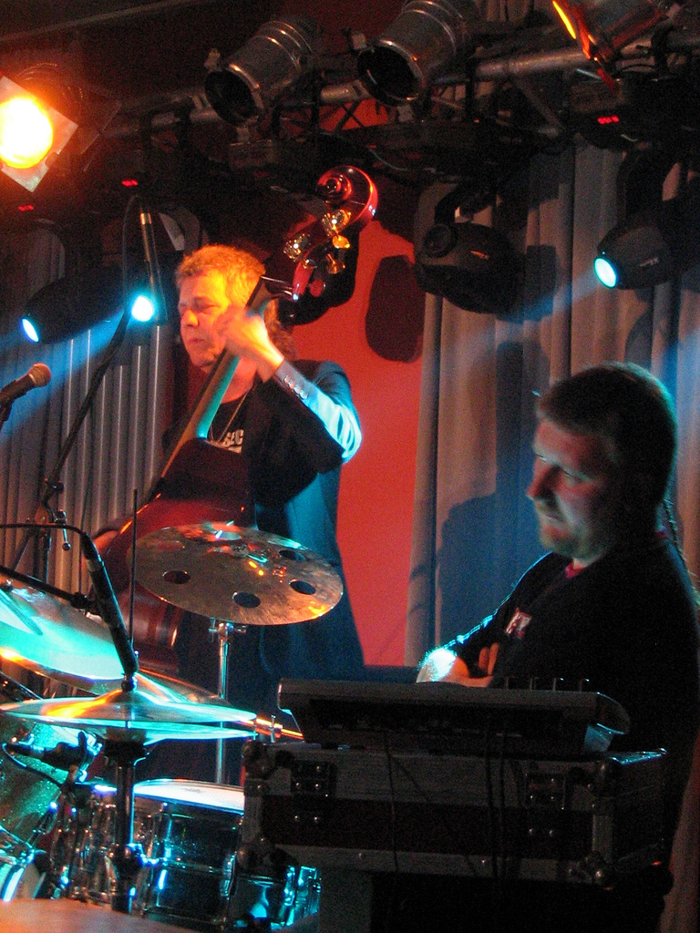 Ed Schuller (double bass) & Adam Czerwiński (Koncert z Jarosławem Śmietaną, Kraków)